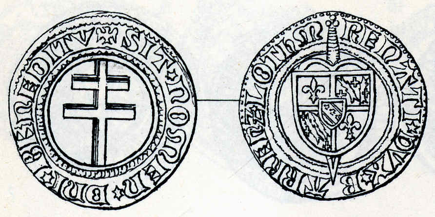 Lorraine, Denier de René Ier, DS X-13